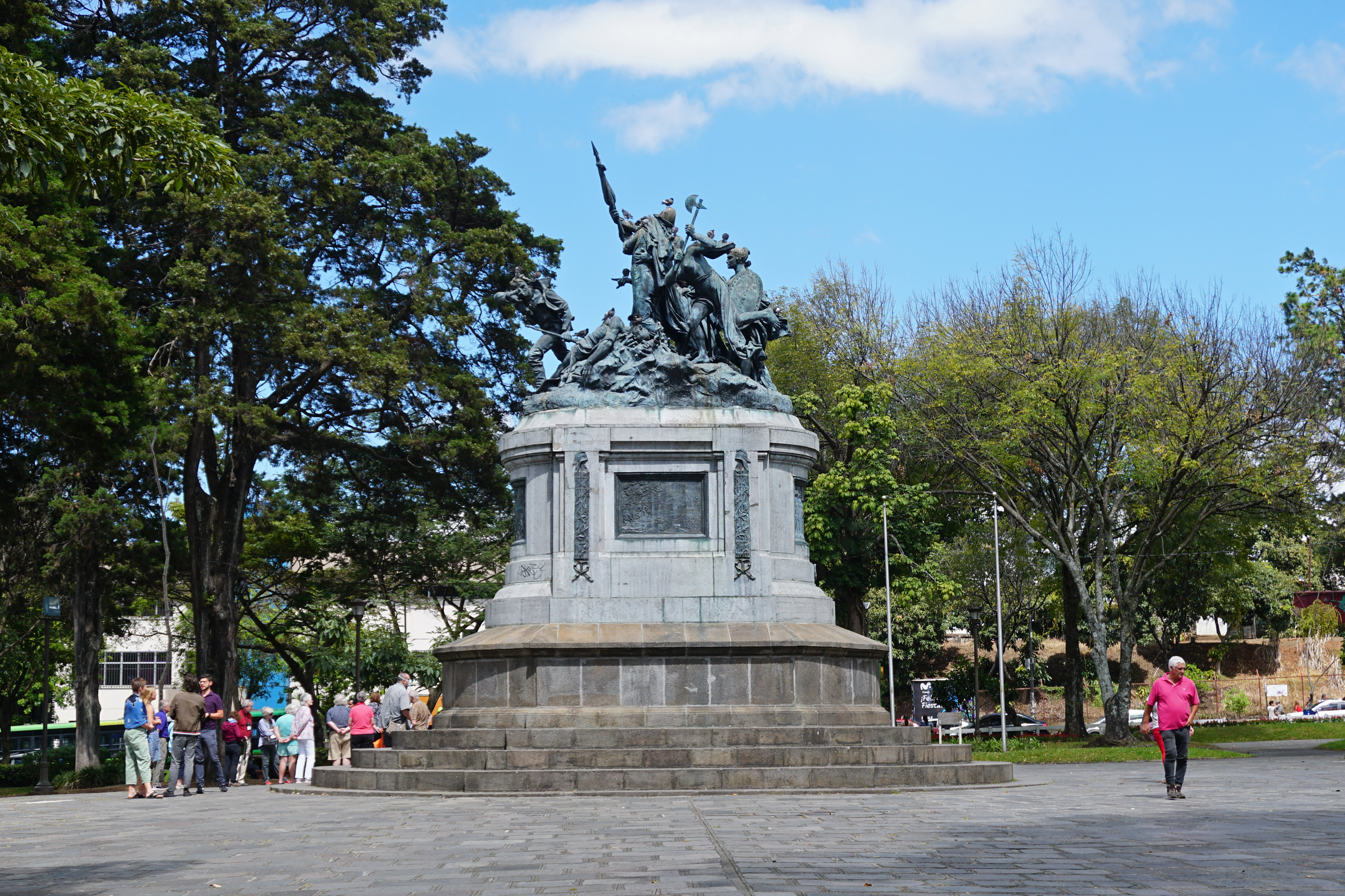 Monumento Nacional de Costa Rica, Parque Nacional, San José